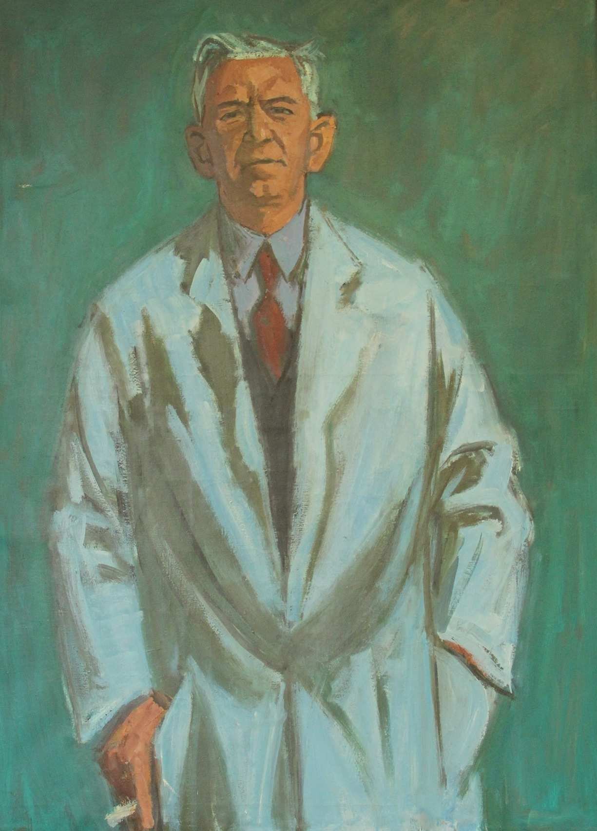 Portrait von Max Müller (Leiter des PZM von 1939 - 1954). Öl auf Leinwand, 1952